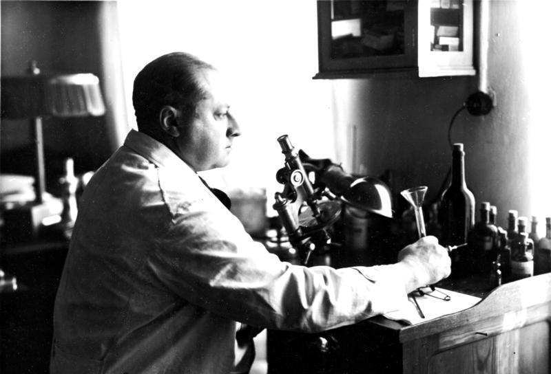 ADN-ZB/Archiv Dr.med. Gottfried Benn, Arzt und Schriftsteller geb.: 2.5.1886 in Mansfeld gest.: 7.7.1956 in Westberlin Studium der Theologie, Philologie und Medizin, erhielt 1951 den Georg-Büchner-Preis (Aufn: 1934) 2897-34